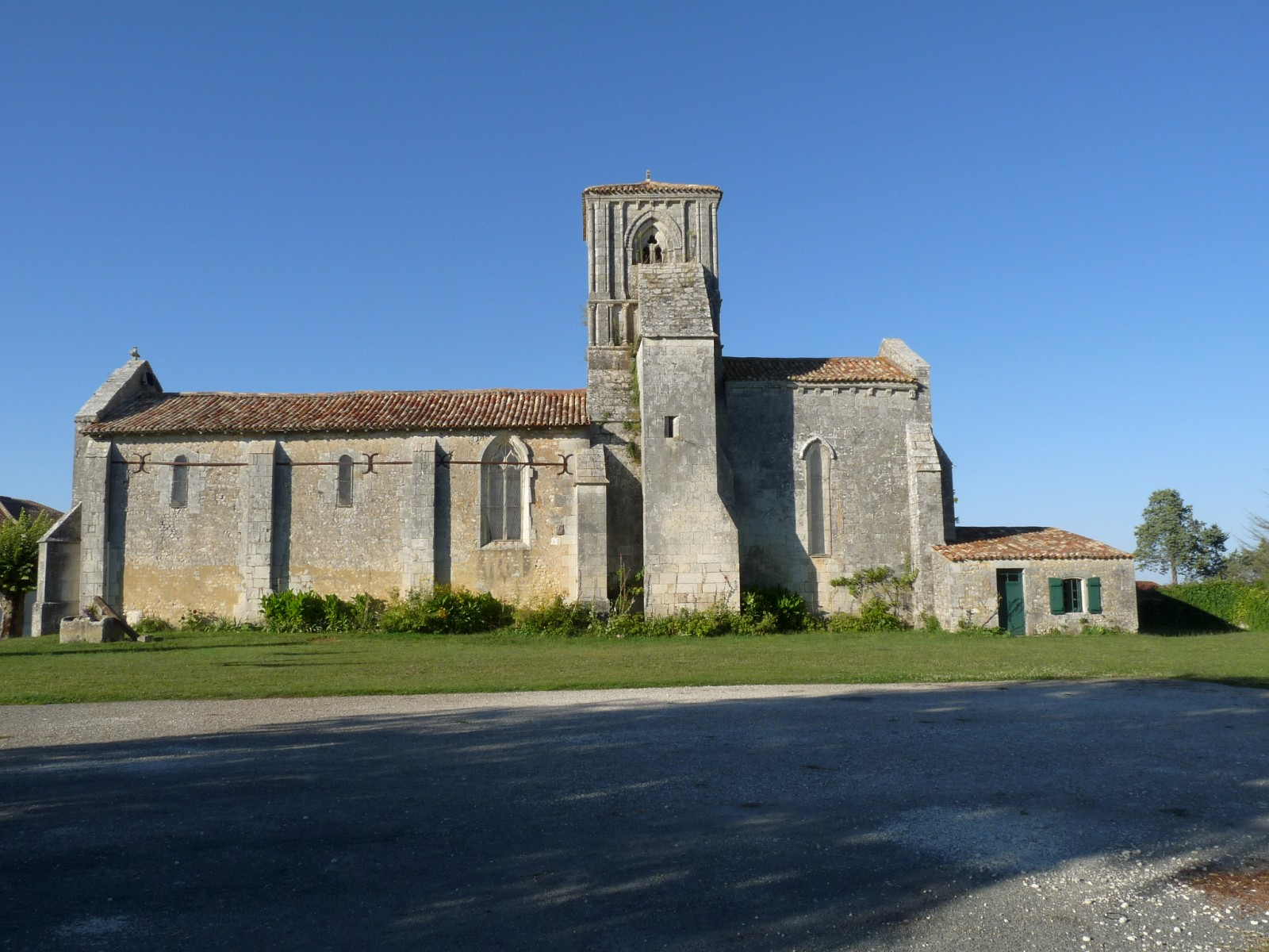 Eglise de Consac, Charente-Maritime, France